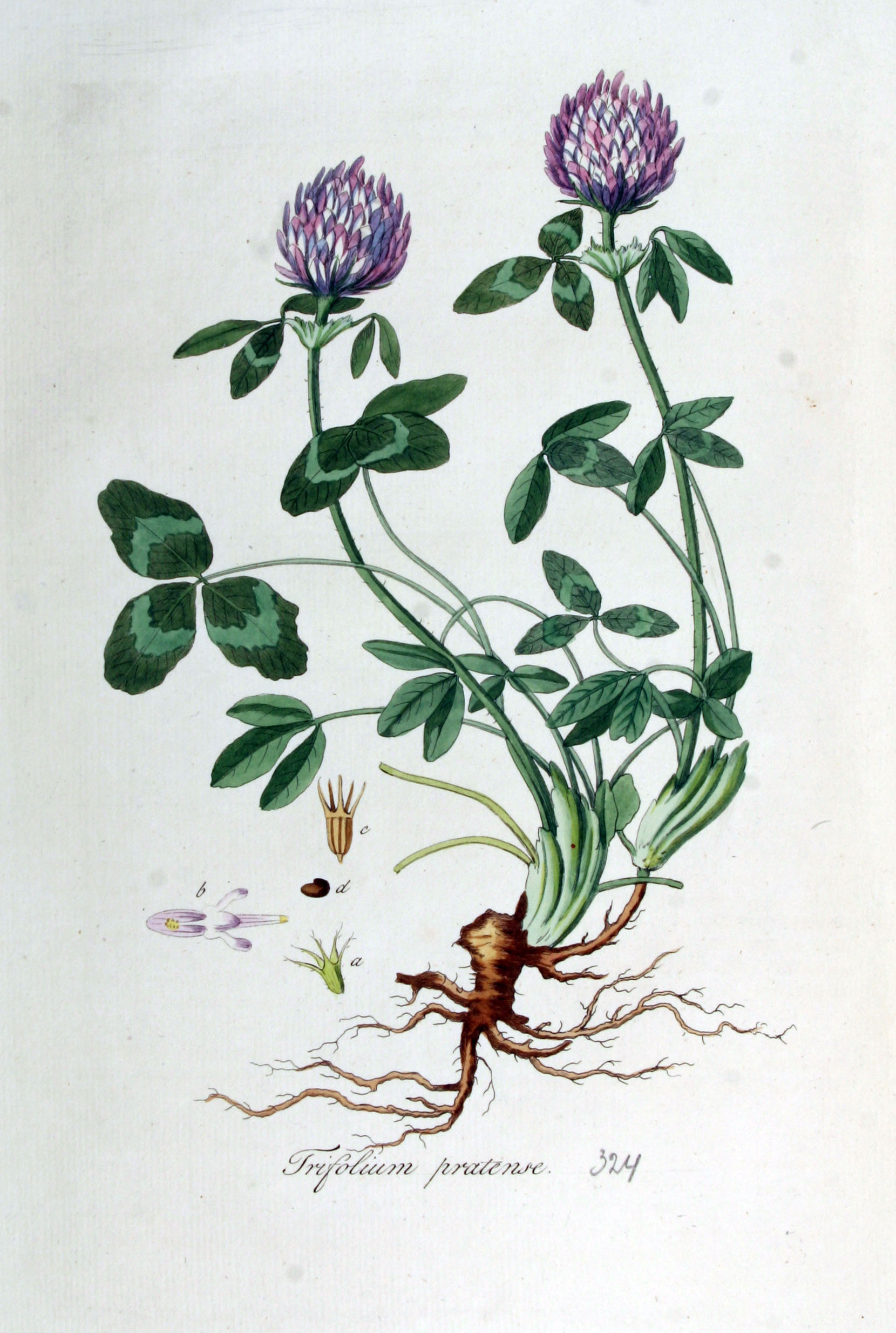 Trifolium pratense L.